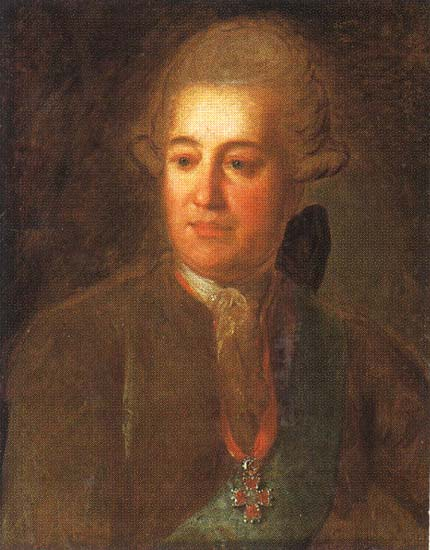 Воронцов Иван Илларионович (1719 - 1786), граф, родной брат канцлера М.И. Воронцова; дядя президента РА княгини Е.Р. Дашковой. Камер-юнкер великого князя Петра Федоровича, с 1761 генерал-поручик. Сенатор (1768), действительный камергер, президент Вотчинной коллегии в Москве. Был женат на М.А. Волынской - дочери знаменитого кабинет-министра Артемия Волынского.